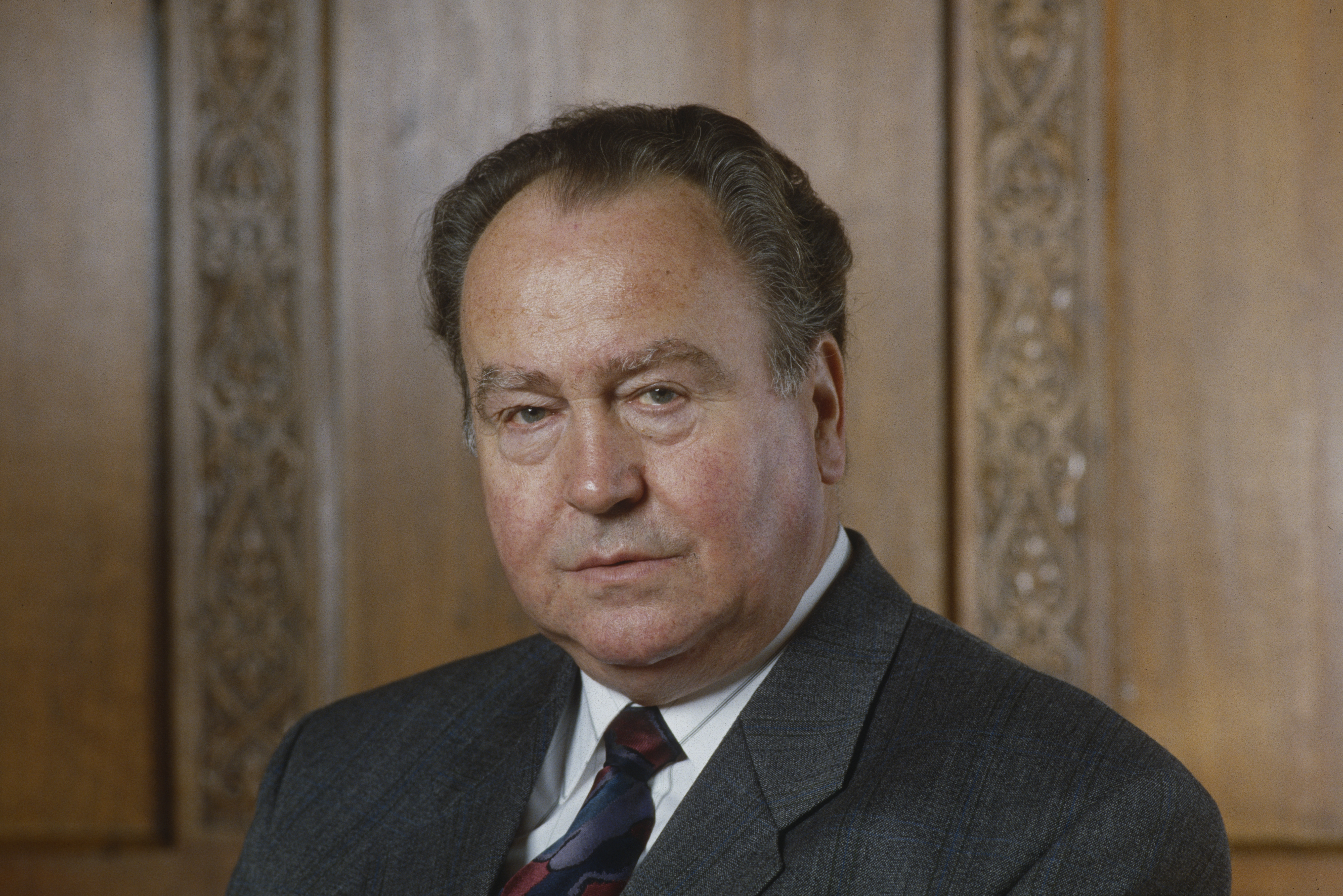 Karl Schnyder (1931–2016), Basler Regierungsrat (SP/DSP, 1976–1994)